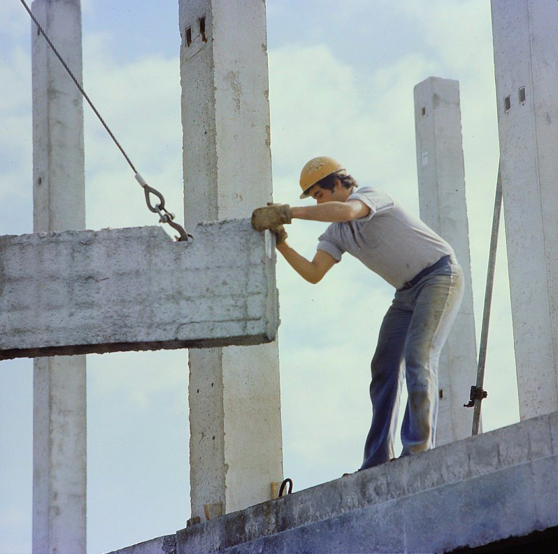 Original image description from the Deutsche Fotothek Baufacharbeiter, Bürogebäude